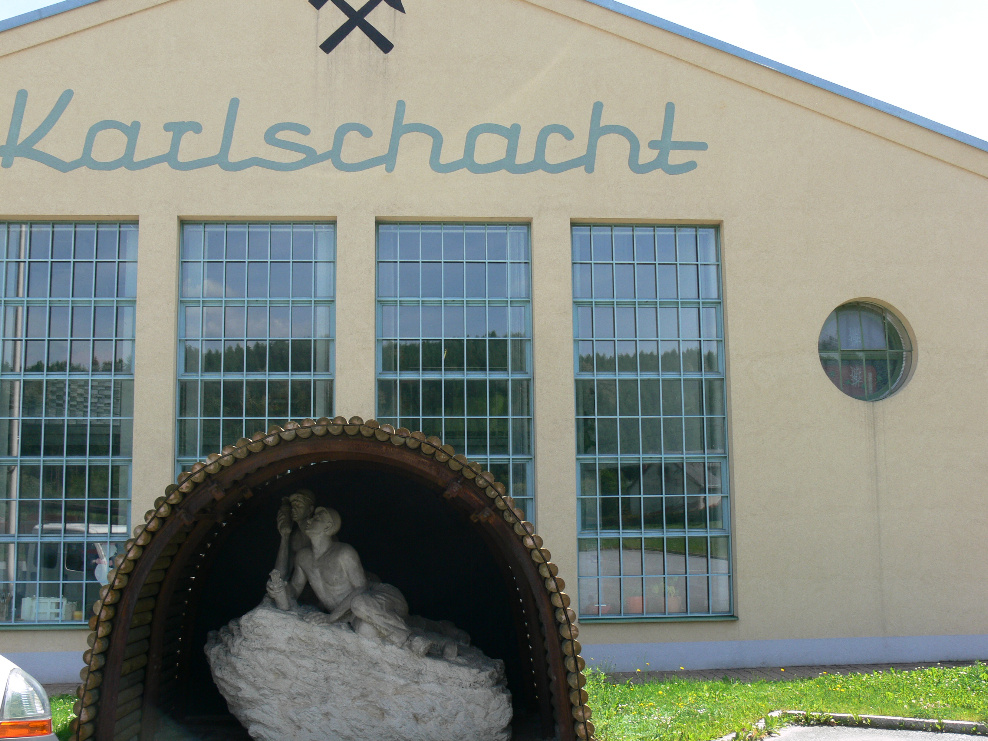 Karlschacht-Mannschaftsbad